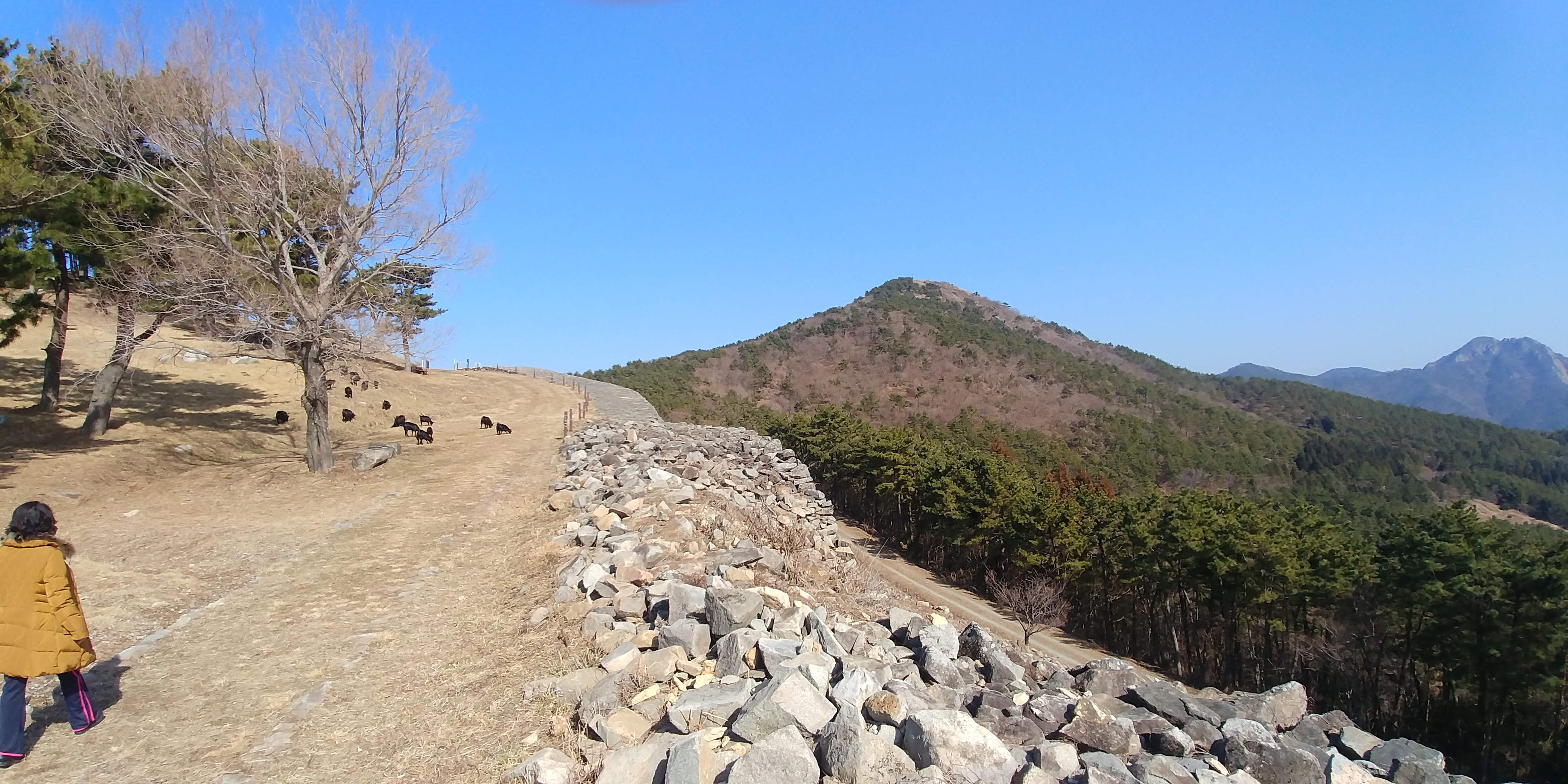 남문에서 입구 쪽 성벽, 키우는 염소가 보인다